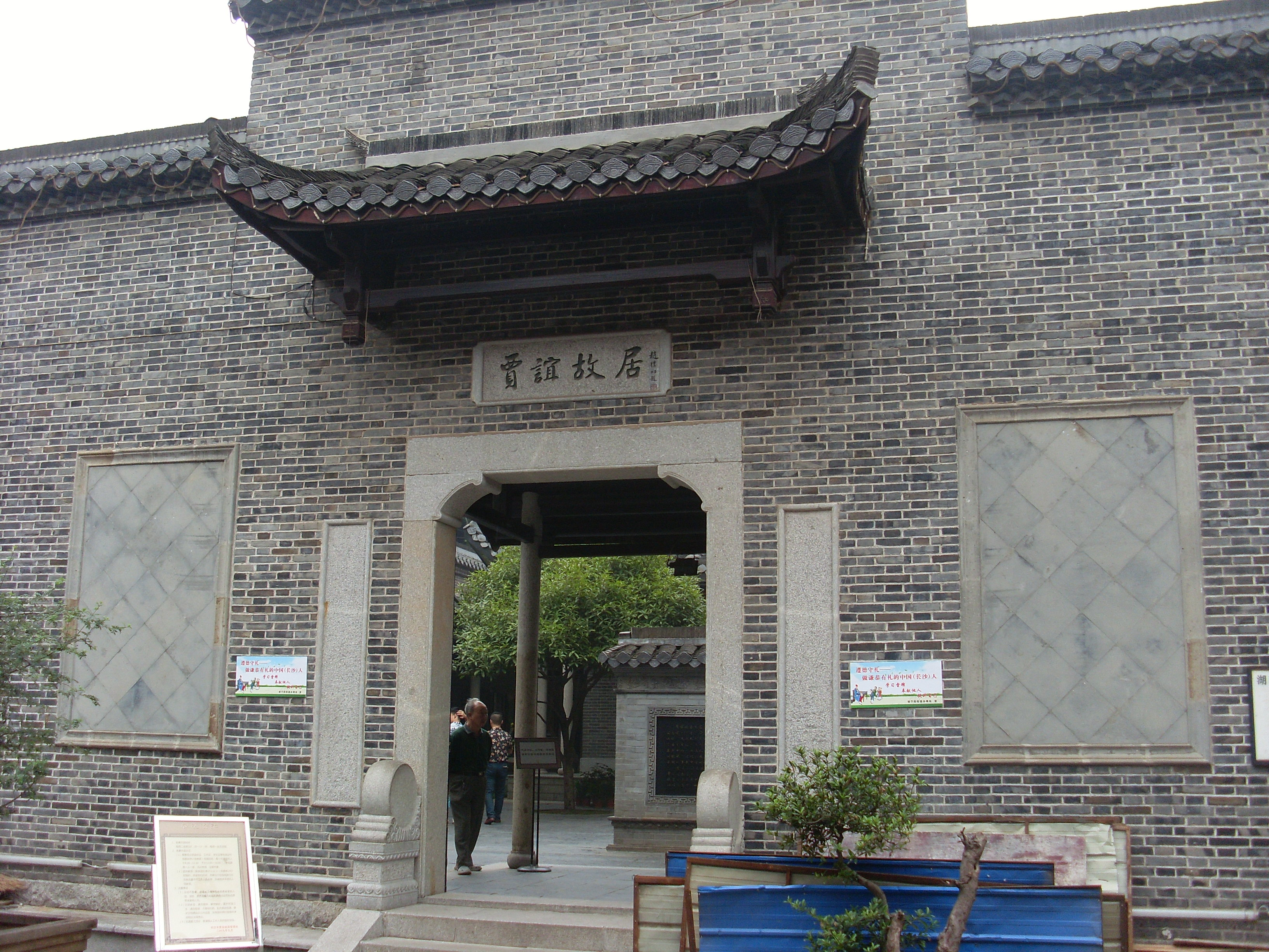 长沙贾谊故居